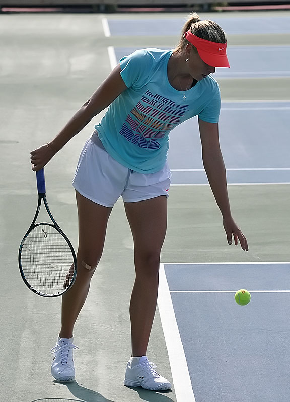 MariaSharapova_0062